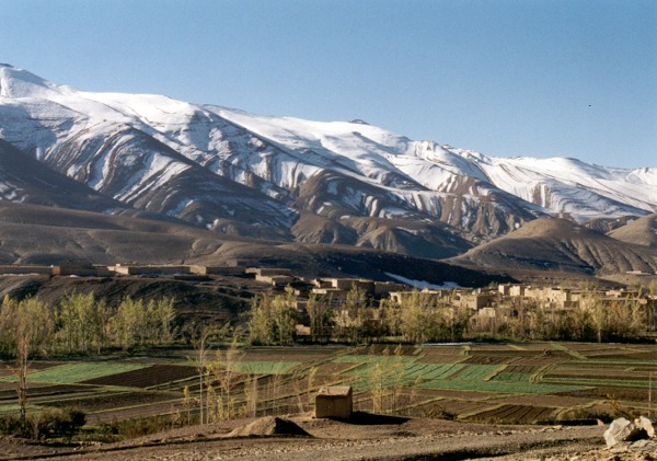 image: "Pascal Poublan " autorisation accordée par mr Pascal Poublan: village du Haut Atlas